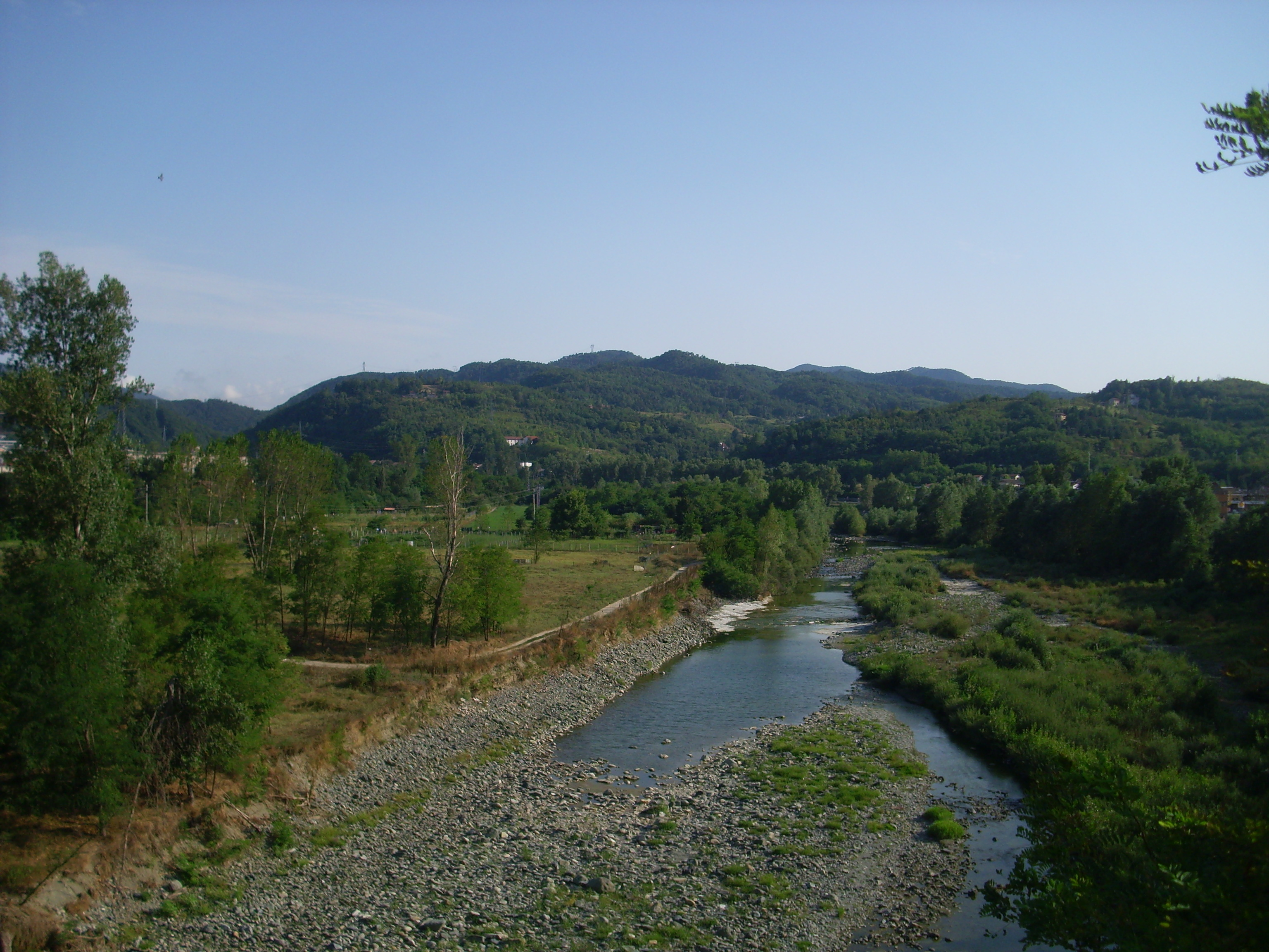 Il torrente Stura, nel tratto che costeggia la cittadina di Ovada.